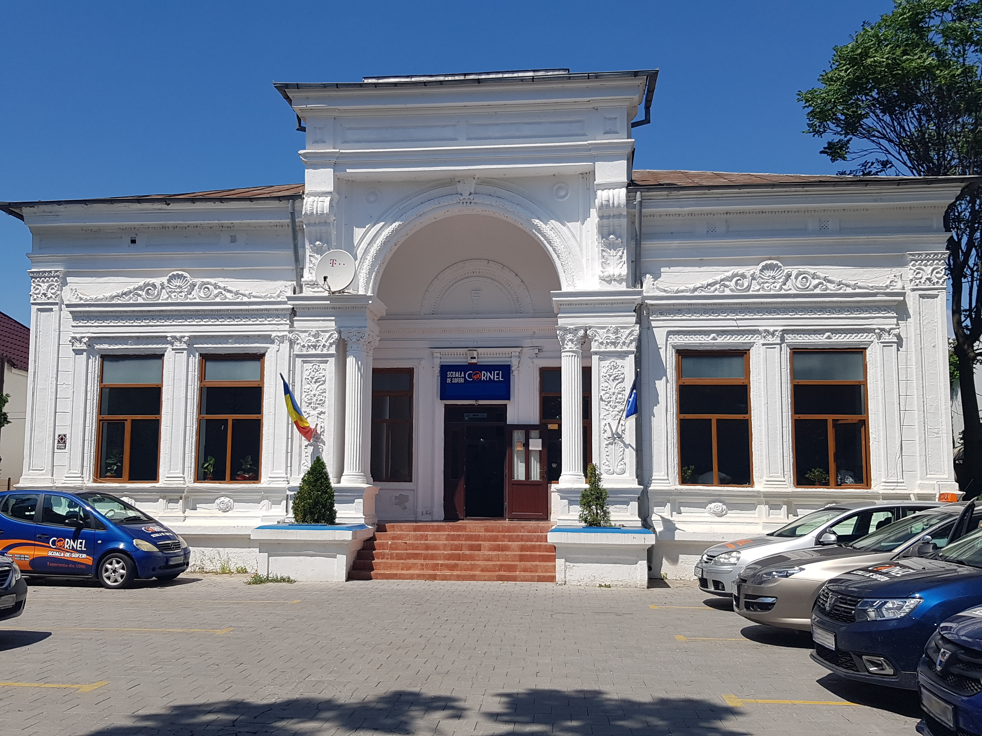 Casa Ferhat